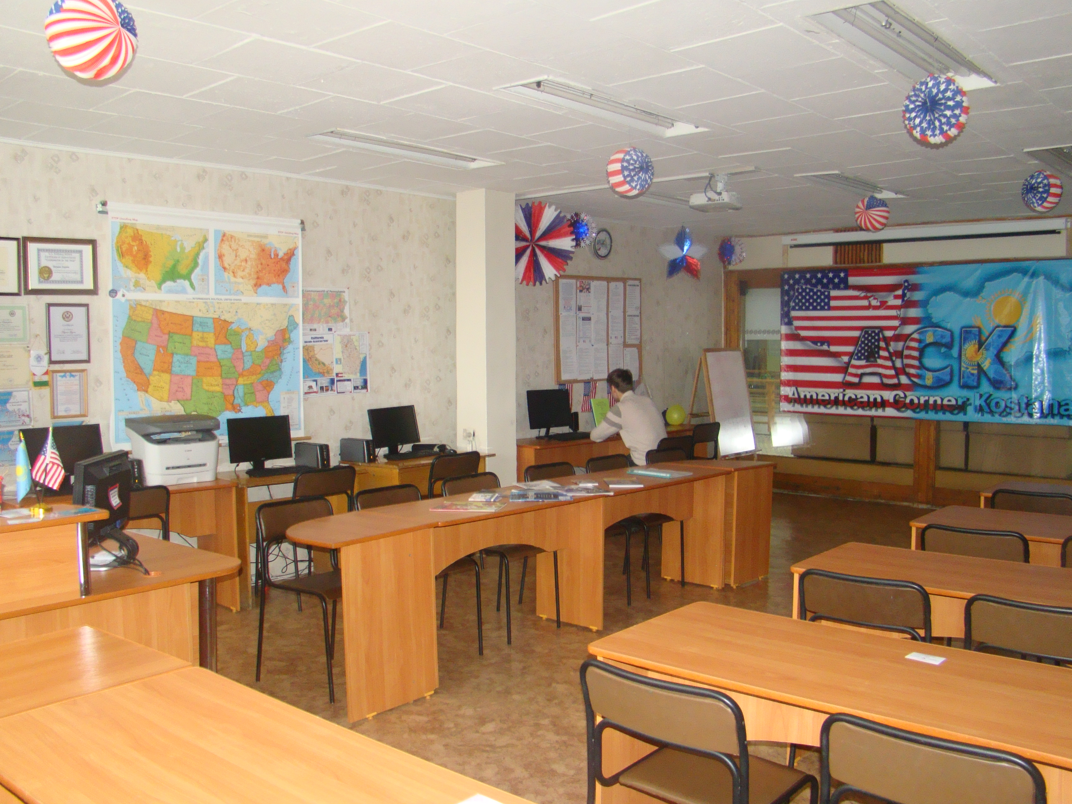 ИРЦ «Американский уголок»